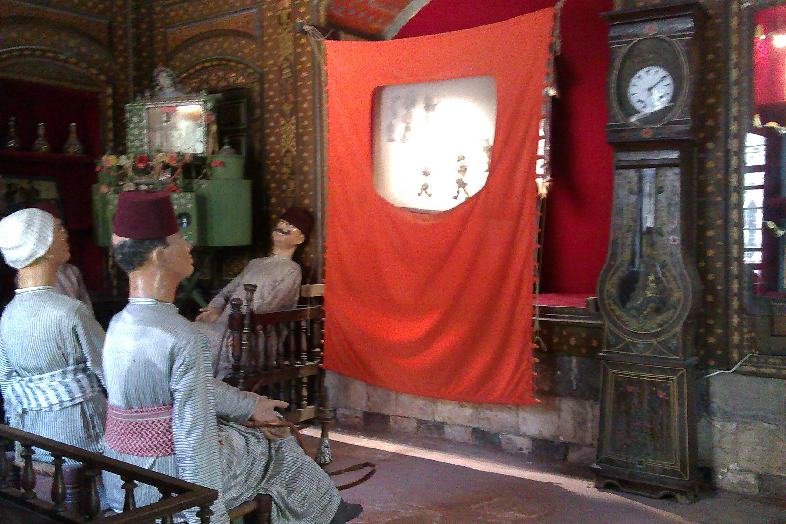 تماثيل شمعية في قصر العظم تمثل عادات و تقاليد أهالي مدينة دمشق